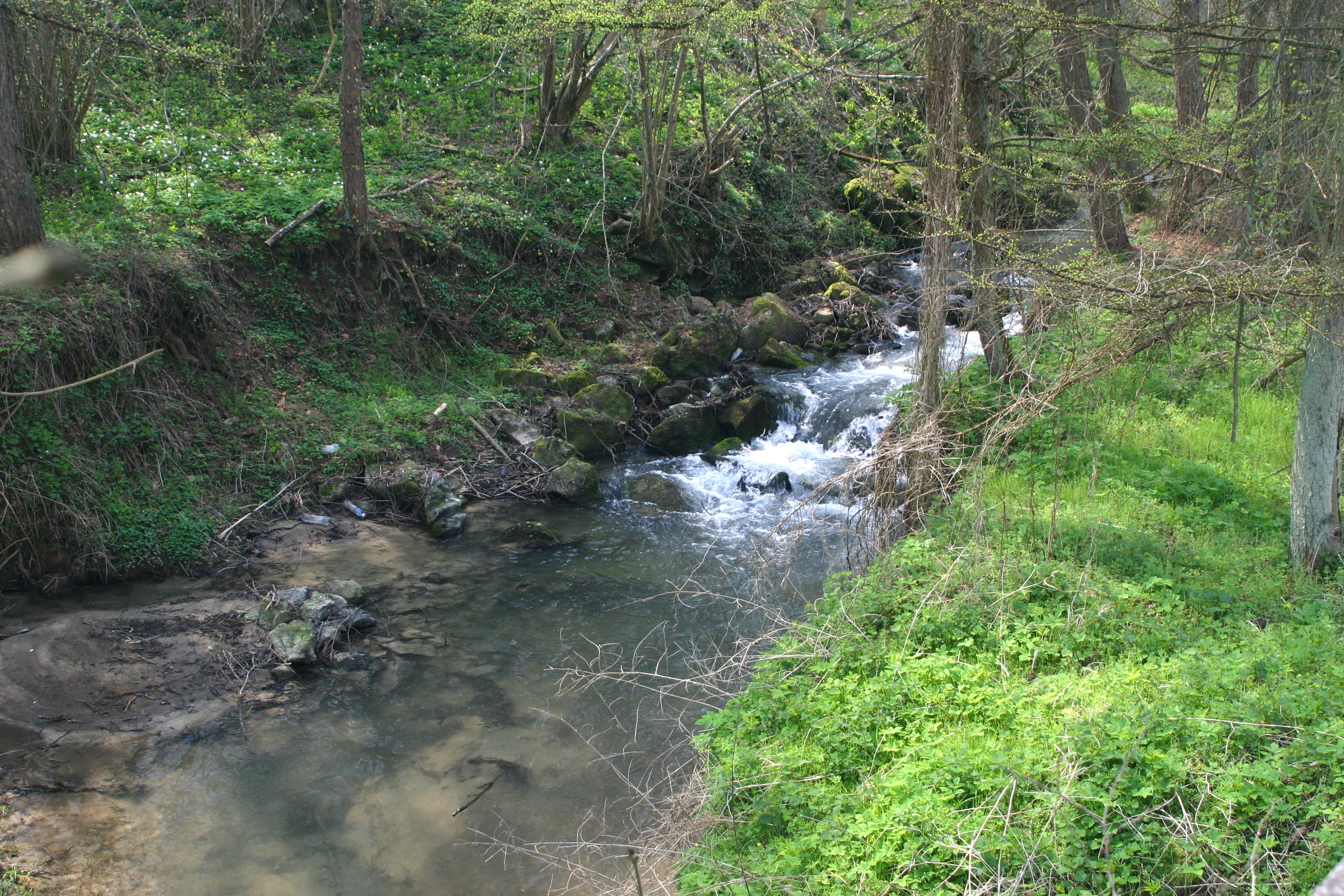 D'Magrée tëscht Berleur a Limont. Foto gemaach op der Bréck vun der Rue du Pas Bayard.